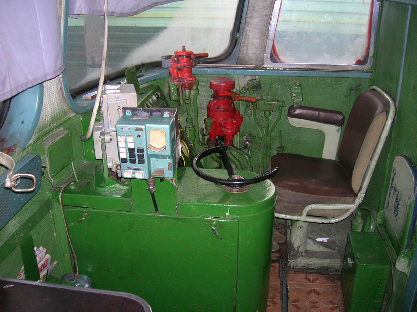 Рабочее место машиниста тепловоза ТЭП60 позднего выпуска